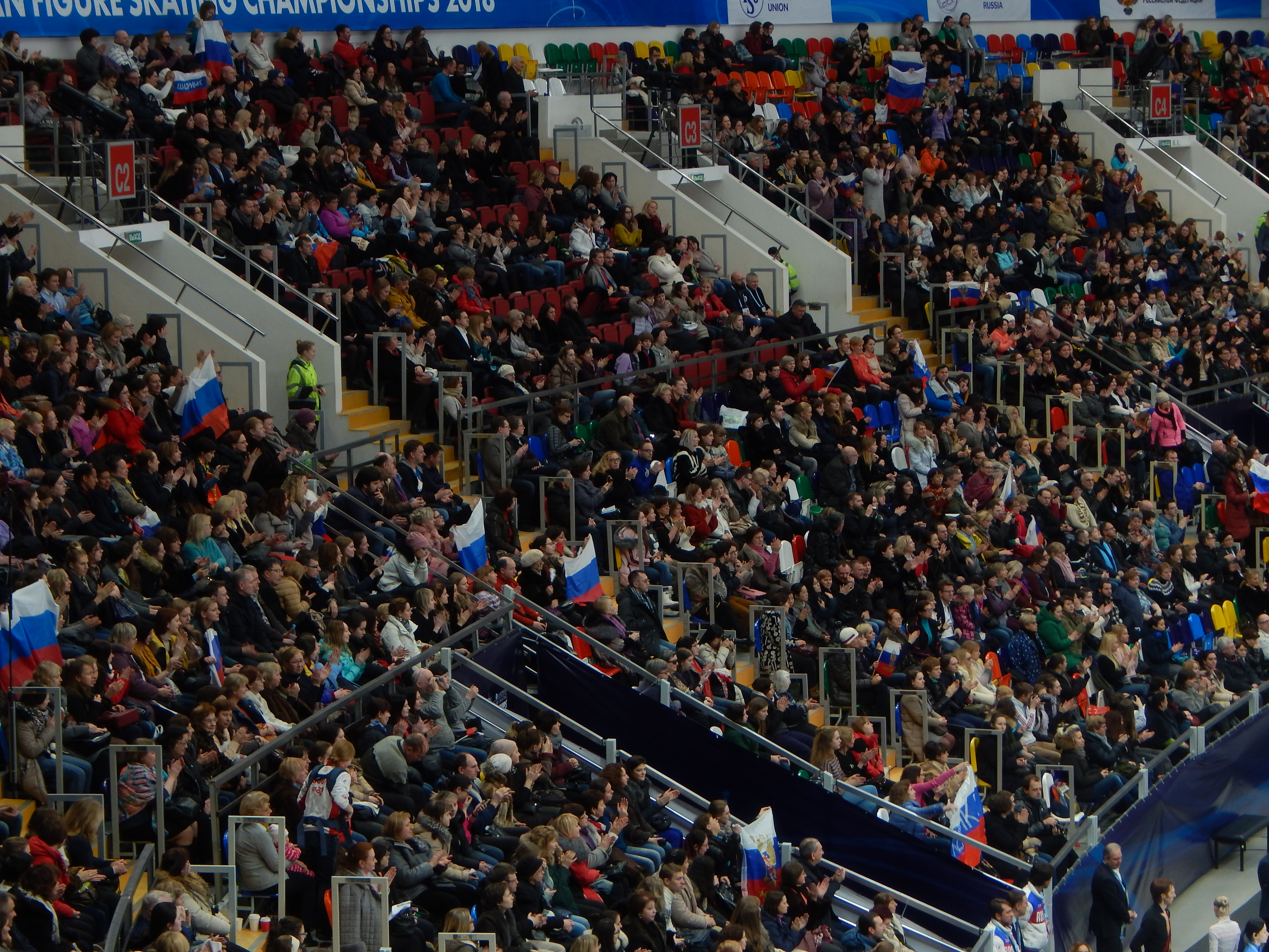 Чемпионат Европы по фигурному катанию 2018 в Москве. Первый день соревнований (17 января). Зрители на арене Мегаспорт, поддерживающие российские пары перед прокатом Натальи Забияко и Александра Энберта